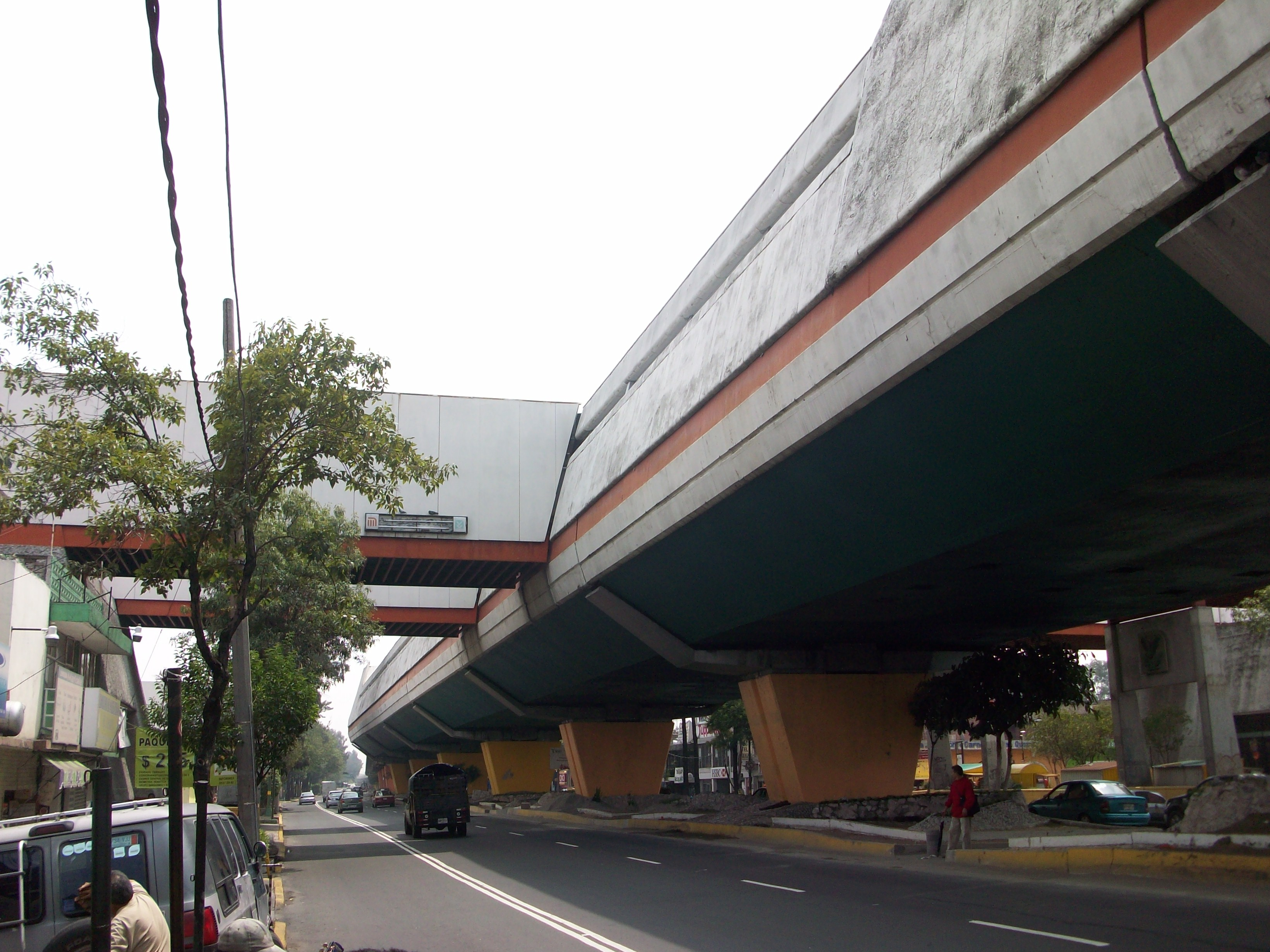 eje 2 oriente